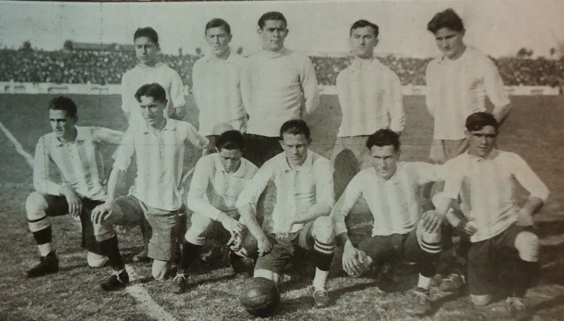 Seleccion Argentina que obtuvo la Copa Premio Ministerio de Relaciones Exteriores el 8 de agosto de 1920 a Uruguay con la siguiente formación: Kiessel; Cortella y Bearzotti; Frumento, Delavalle y Uslengui; Calomino, Libonatti, Badalini, Lucarelli y Miguel.